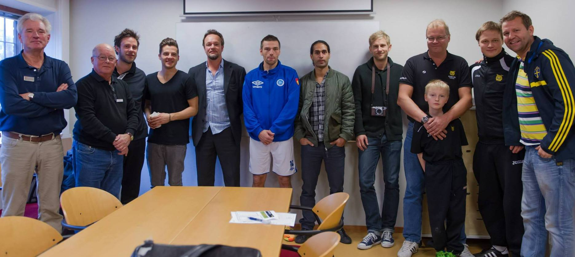 Deltagarna vid mötet 2013 i Stockholm då det beslöts att NFC ska vara en tävling som ingen äger och att vinnaren arrangerar kommande år.